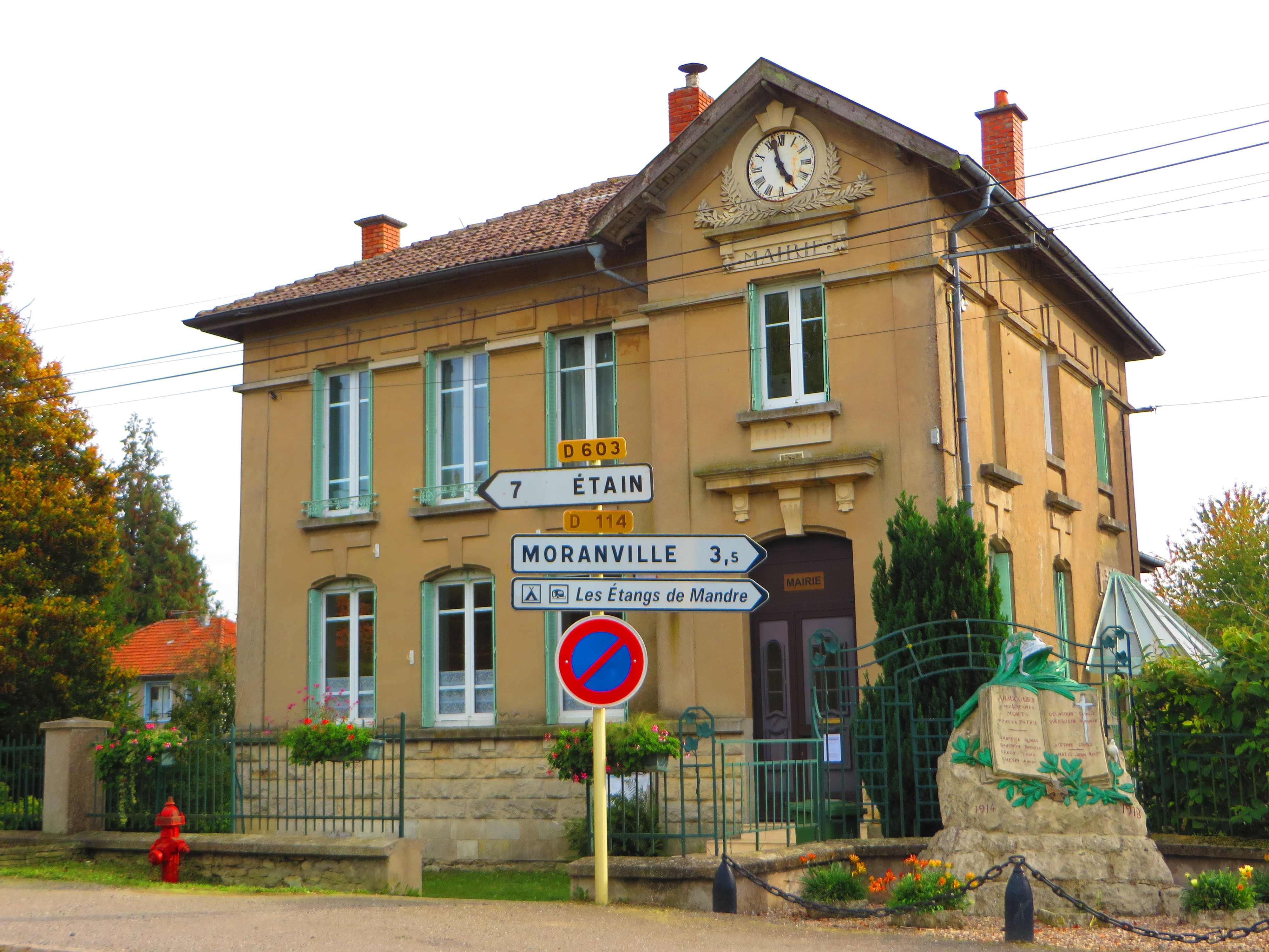 Abaucourt-Hautecourt la mairie